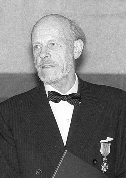 Prof. Arne E. Holm utnevnes til ridder av St.Olavs orden, 24. januar 1979 i Rådssalen, Hovedbygningen, NTH (NTH fra 1996 integrert i NTNU)